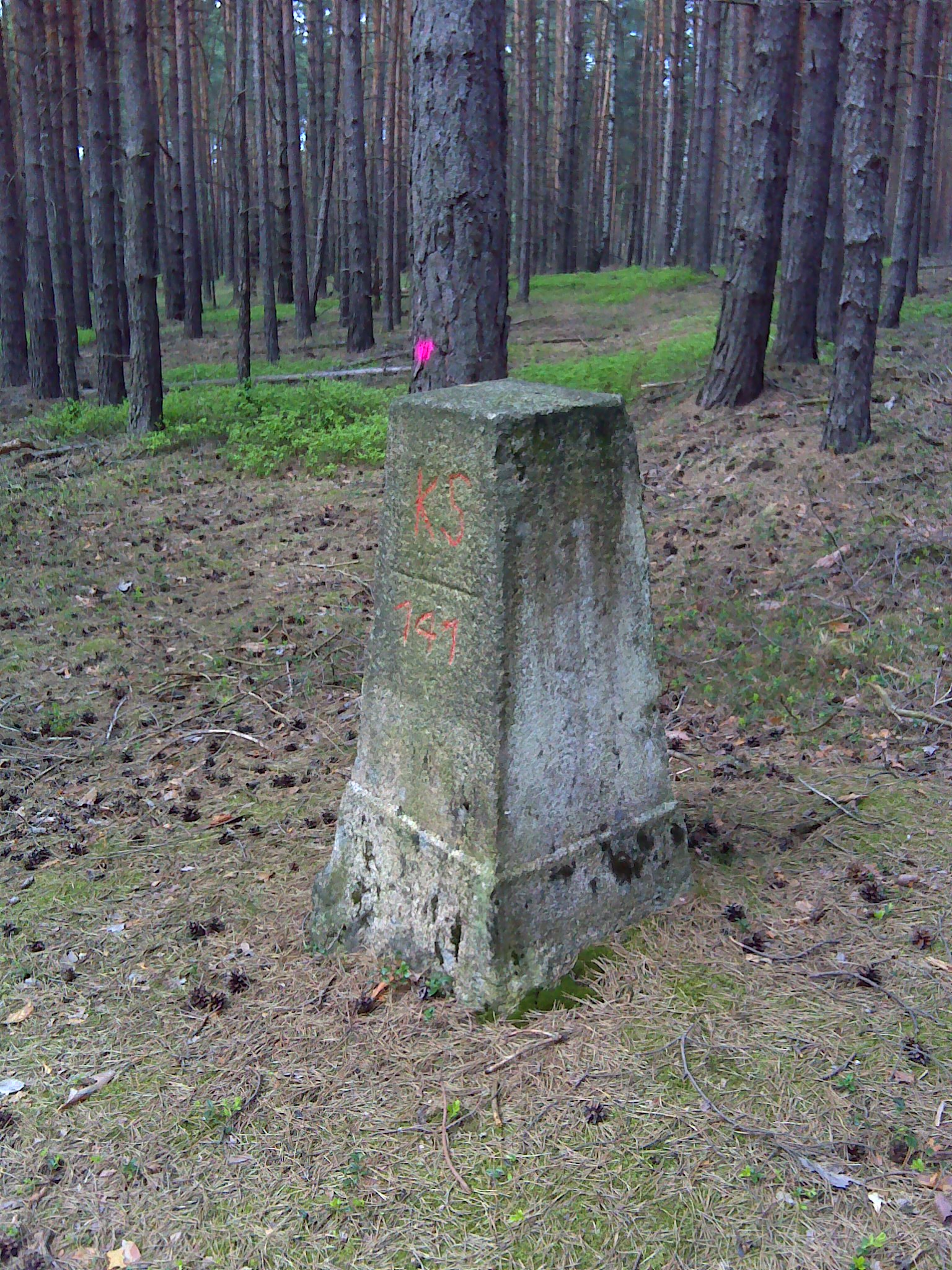 Historischer Grenzstein Nr. 141 der sächsisch-preußischen Grenze 1815